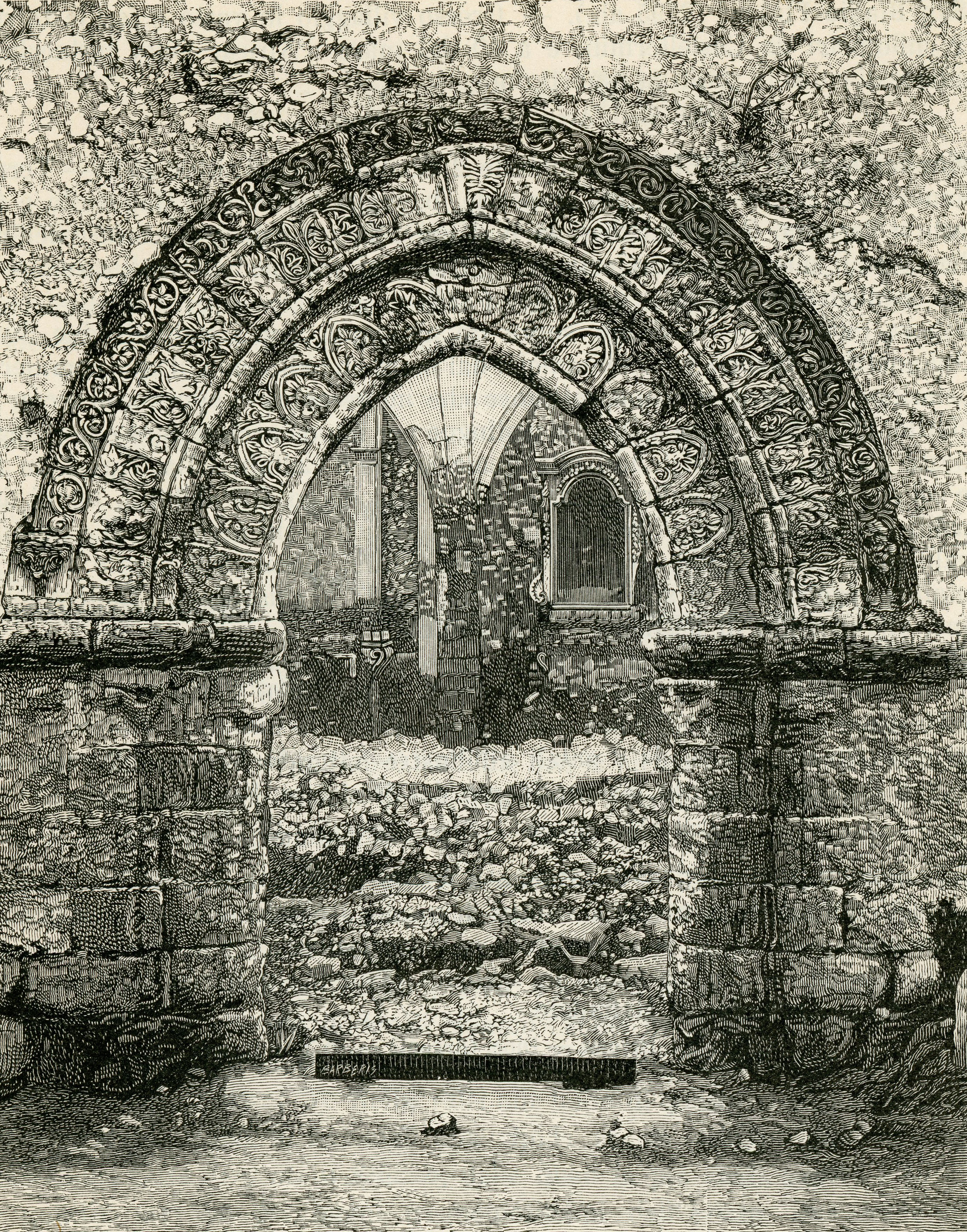 Bivona: Dettaglio della chiesa. Arco normanno (xilografia di Barberis).